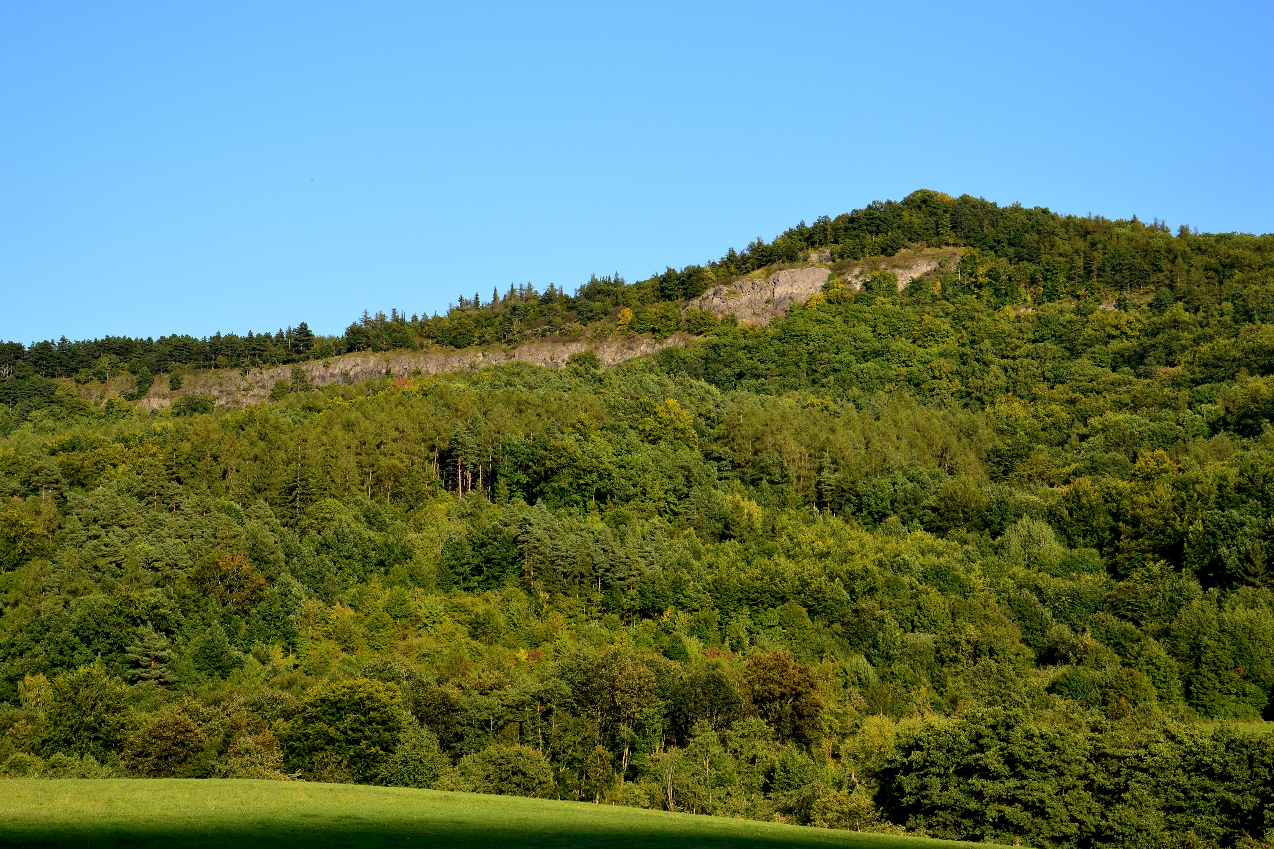 Celkový pohled z Lestkova